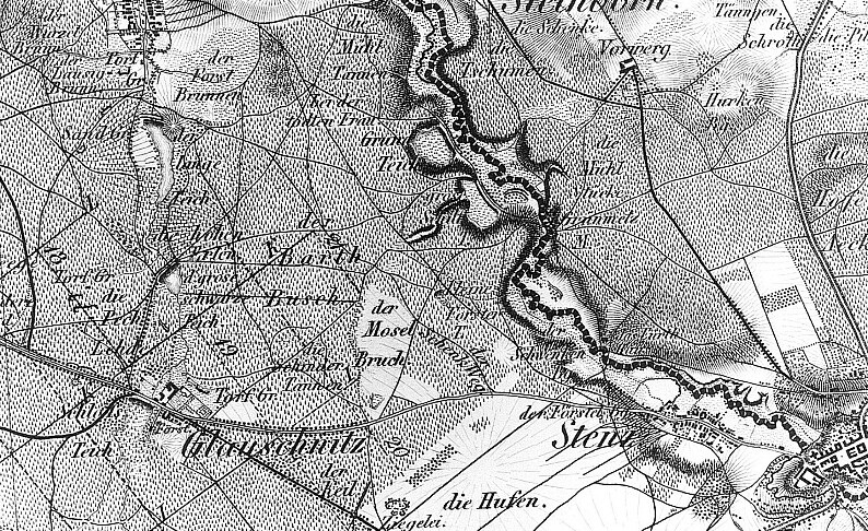 Original image description from the Deutsche FotothekKönigsbrück-Stenz. Oberreit, Sect. Großenhain, 1841/43